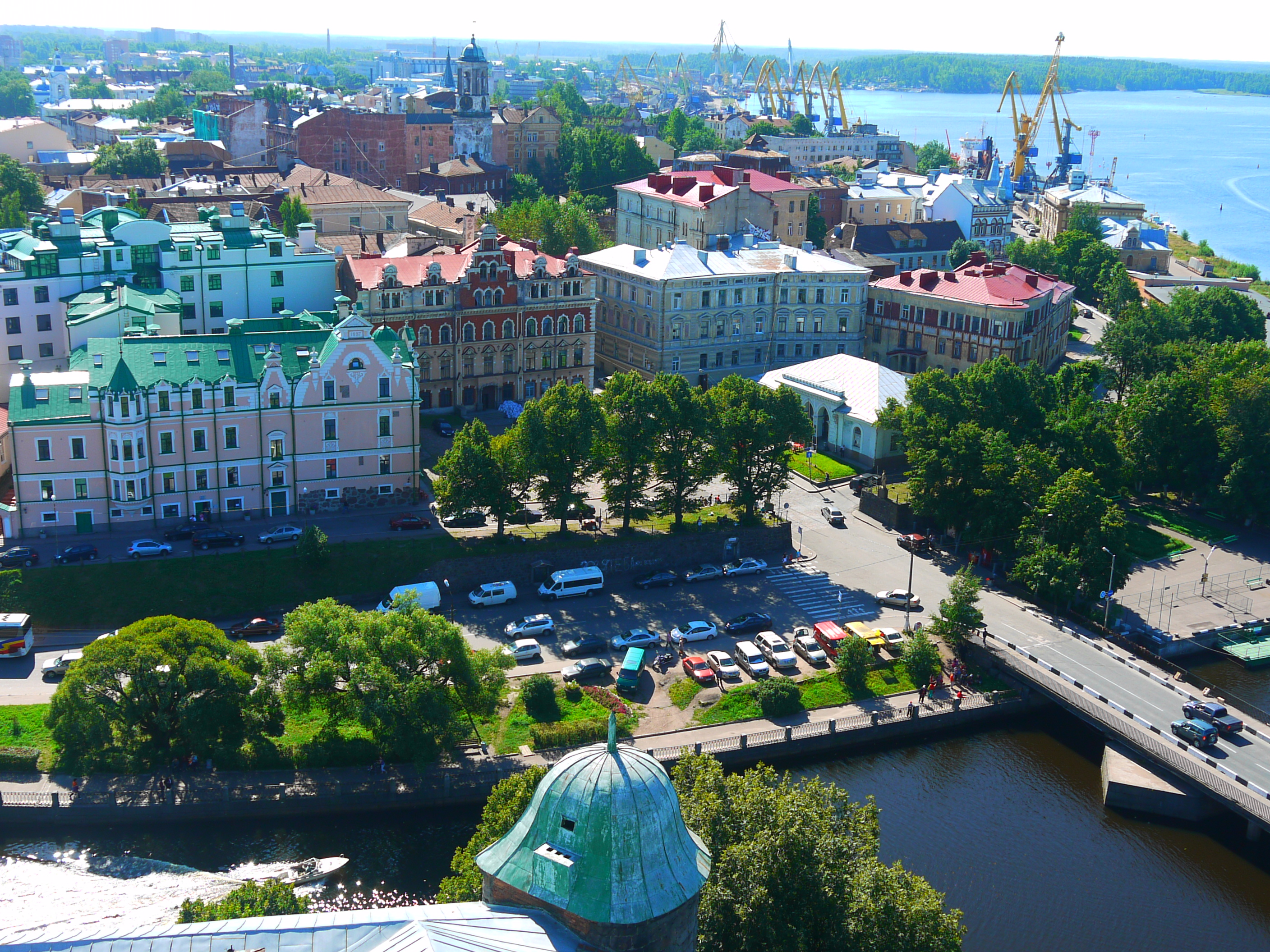 Здание городского музея (Санкт-Петербург и Лен.область, Выборг, крепостная улица, 2)